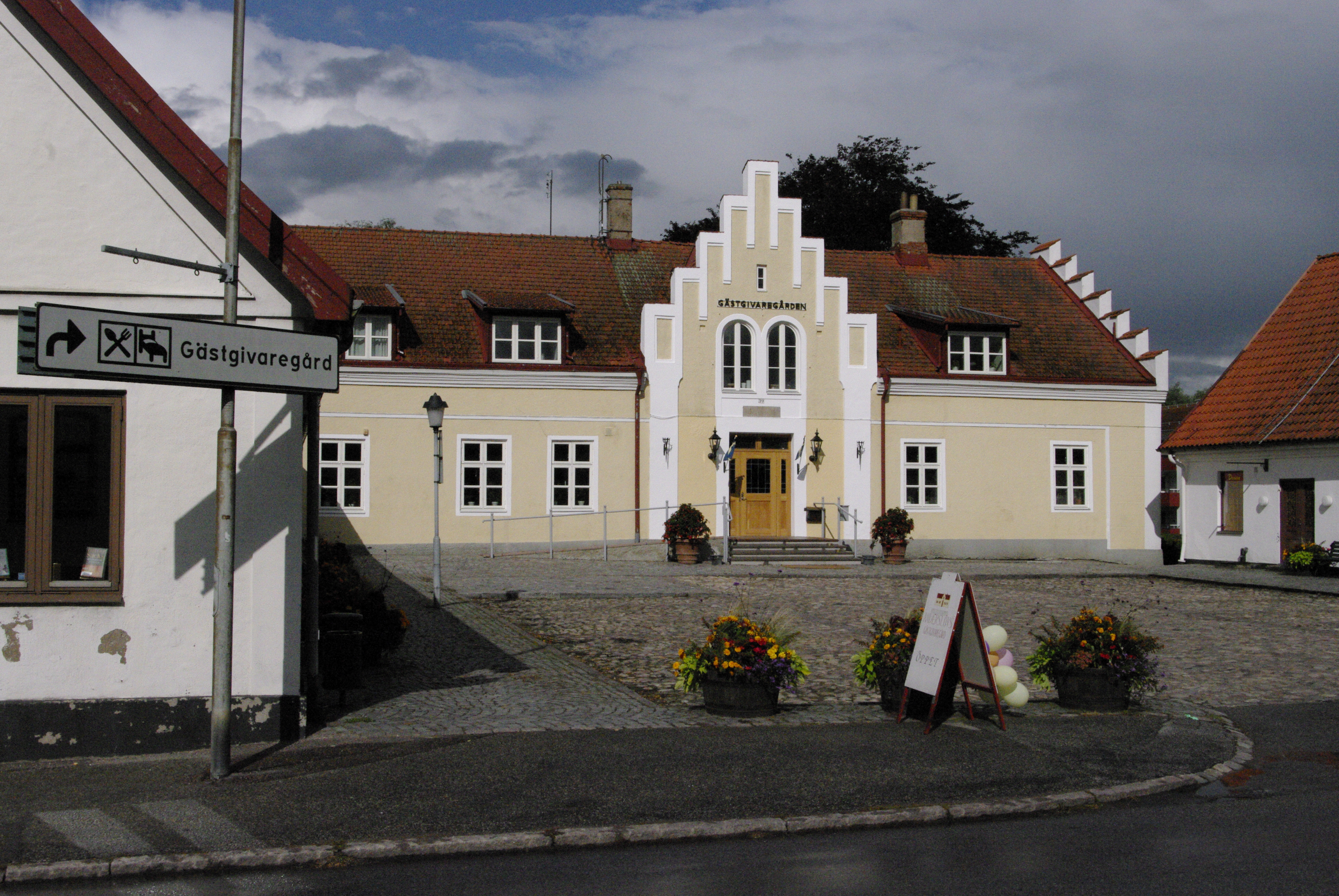 Gästgivaregården i Anderslöv